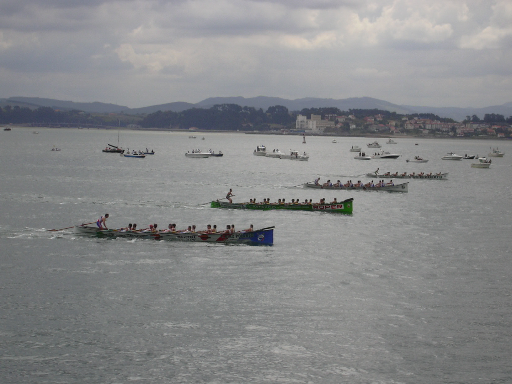 Primera tanda del Regional de Traineras de 2006 con Pontejos, Camargo, Santander y Colindres.